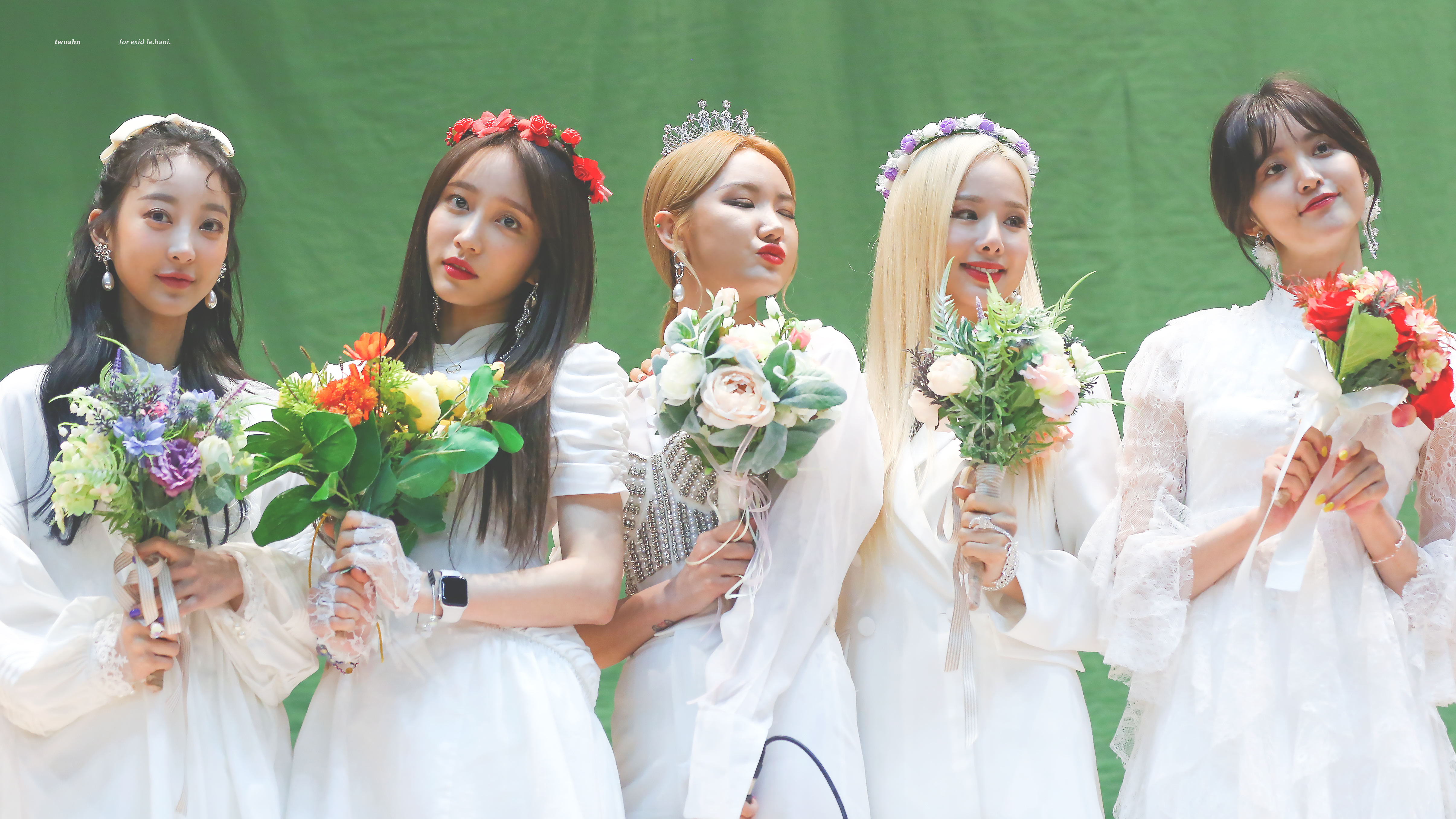 190526 목동 팬싸인회